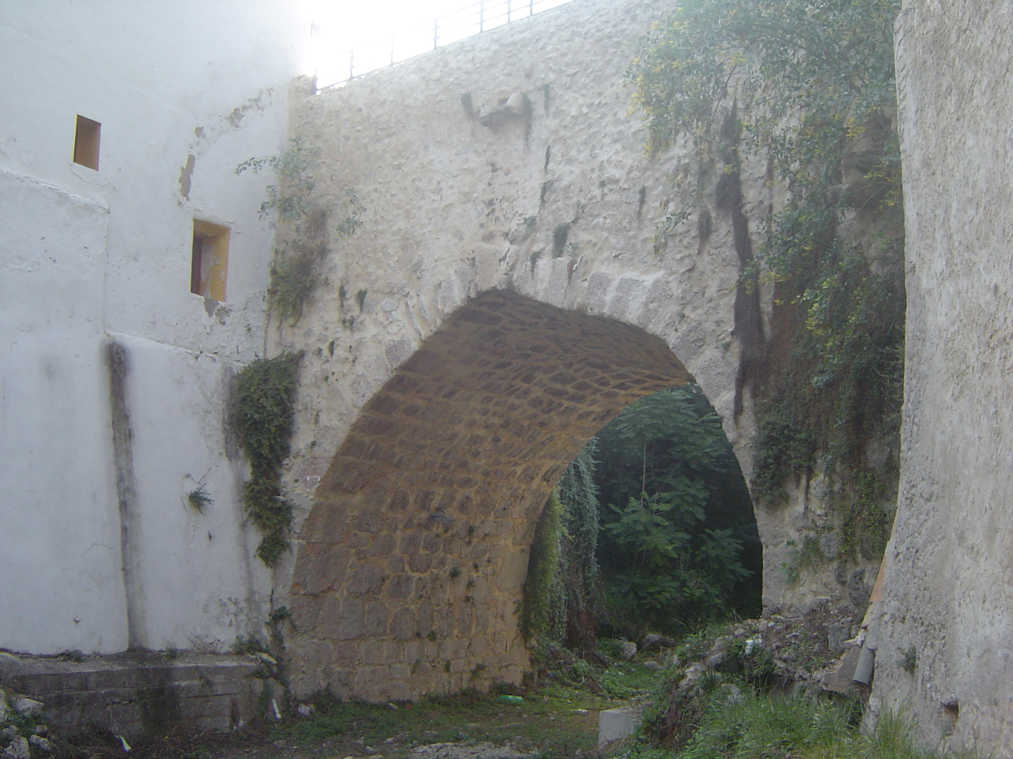 Puente de la Calle de la Cadena o "Puente Romano" en Mogente